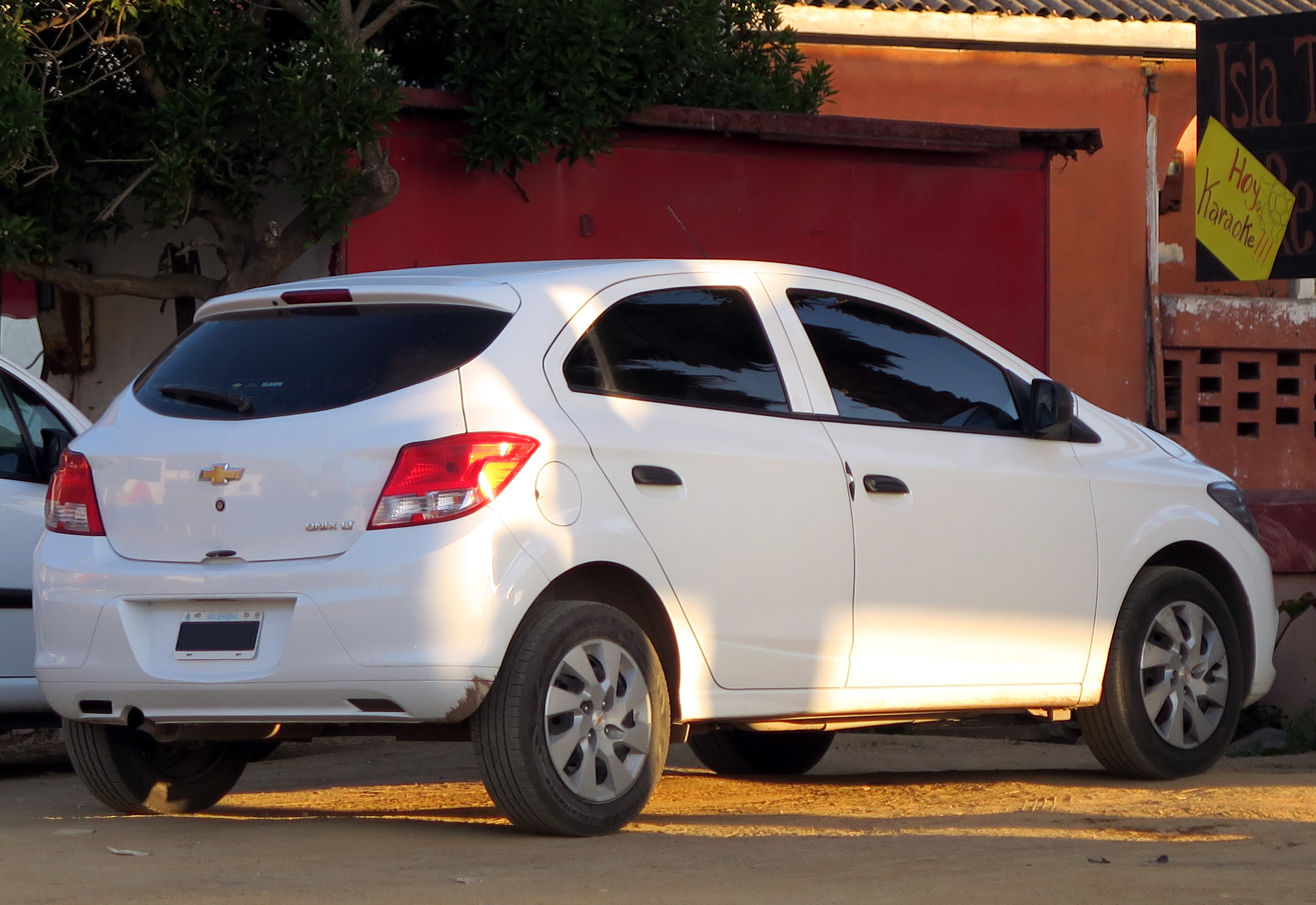 Chevrolet Onix 1.4 LT 2014